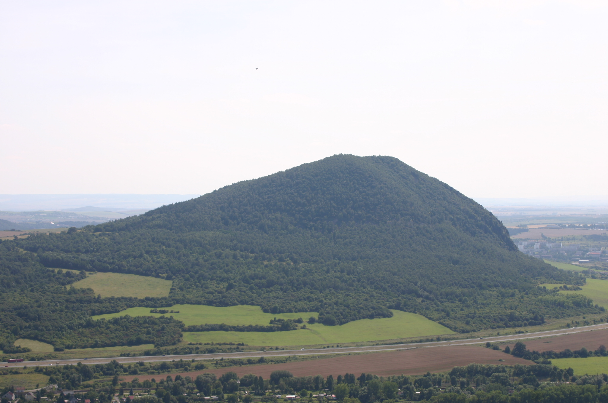 Kopec Zlatník v okrese Most